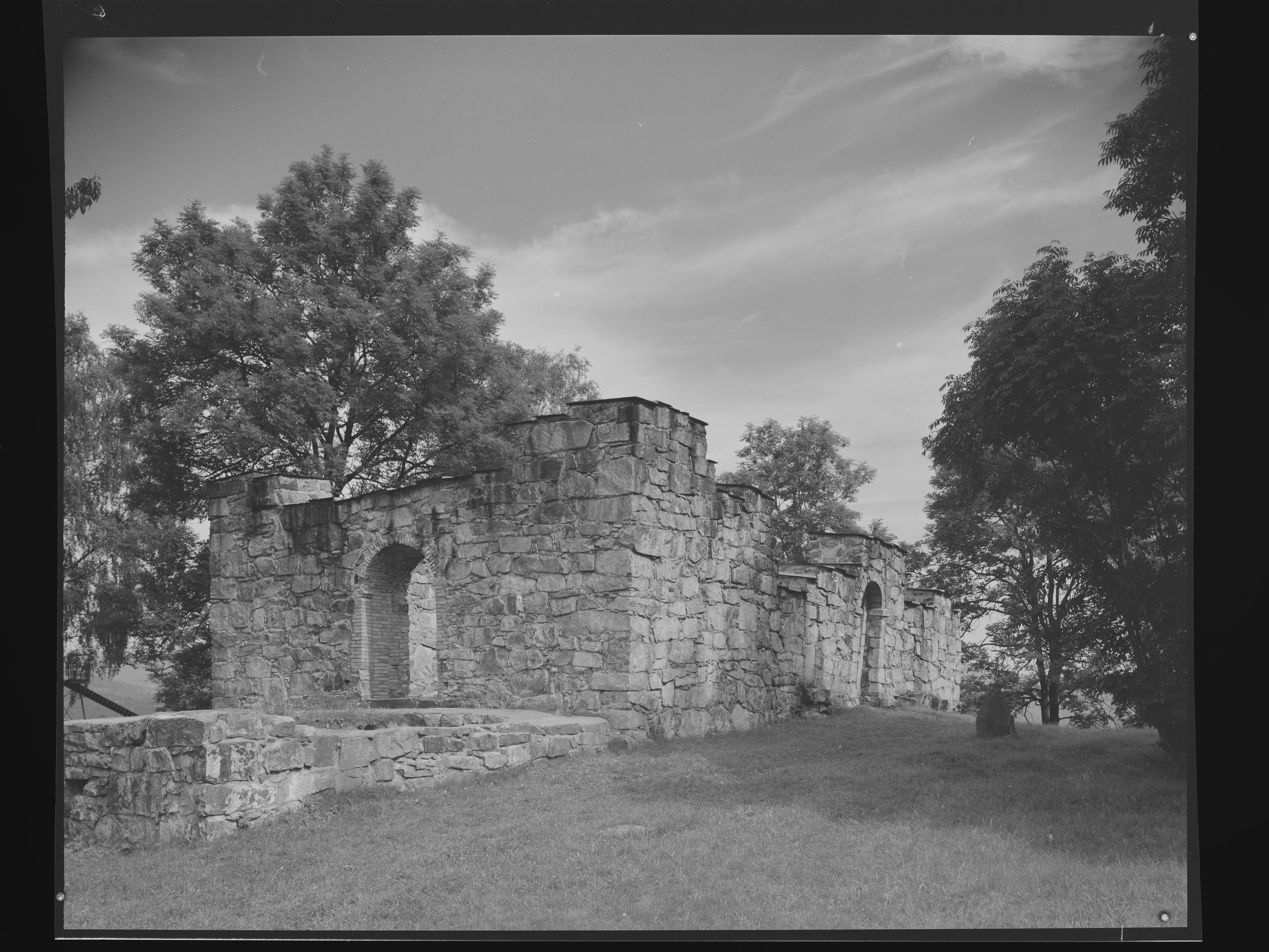 Bildet er hentet fra Nasjonalbibliotekets bildesamling Ulefoss, Nome, Telemark